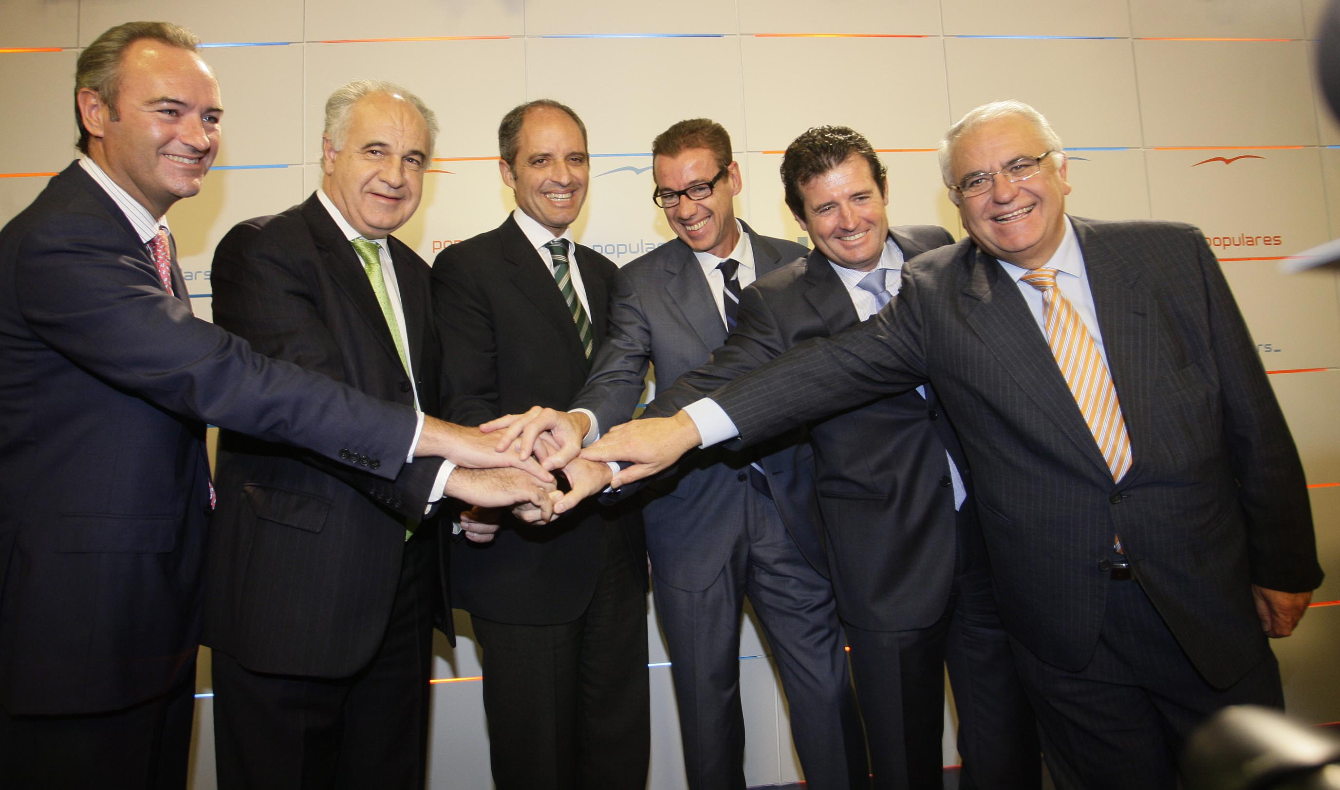 Fabra, Blasco, Camps, Clemente, Císcar y Cotino